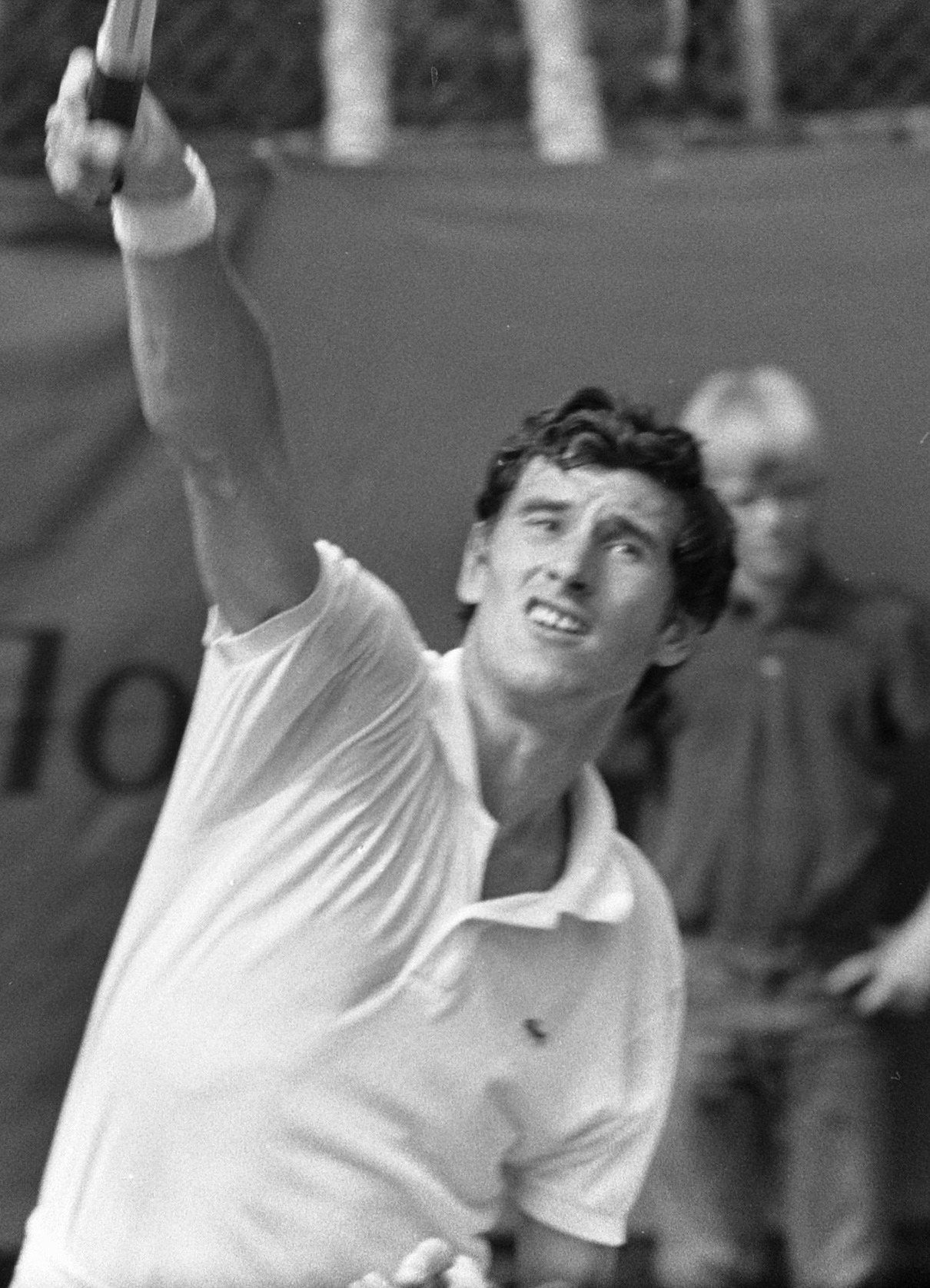 Internationale tenniskampioenschappen in Hilversum. Milan Holecek (Tsjecho-Slowakije) in actie